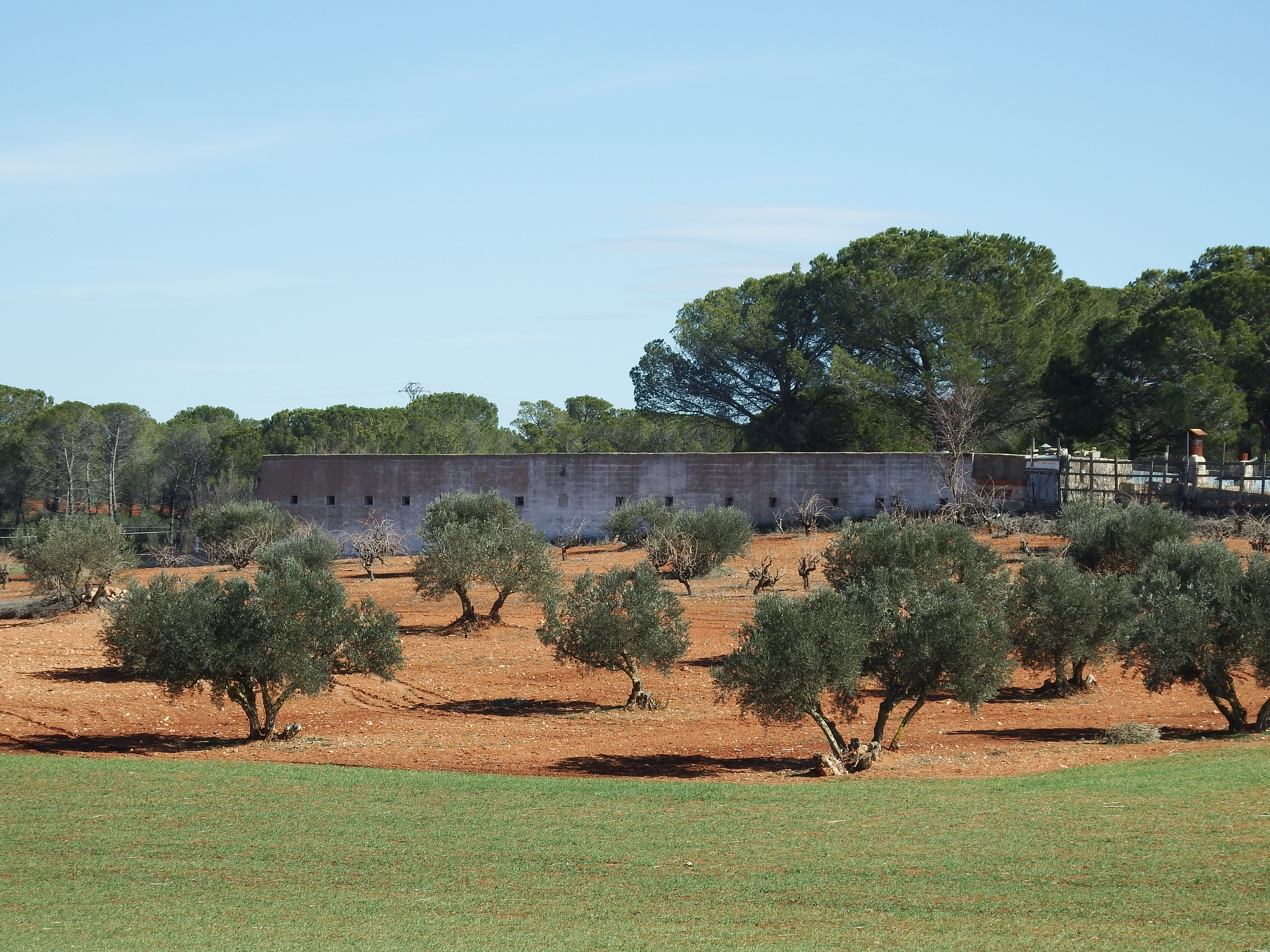 Depósito de agua de Motilla de Palancar